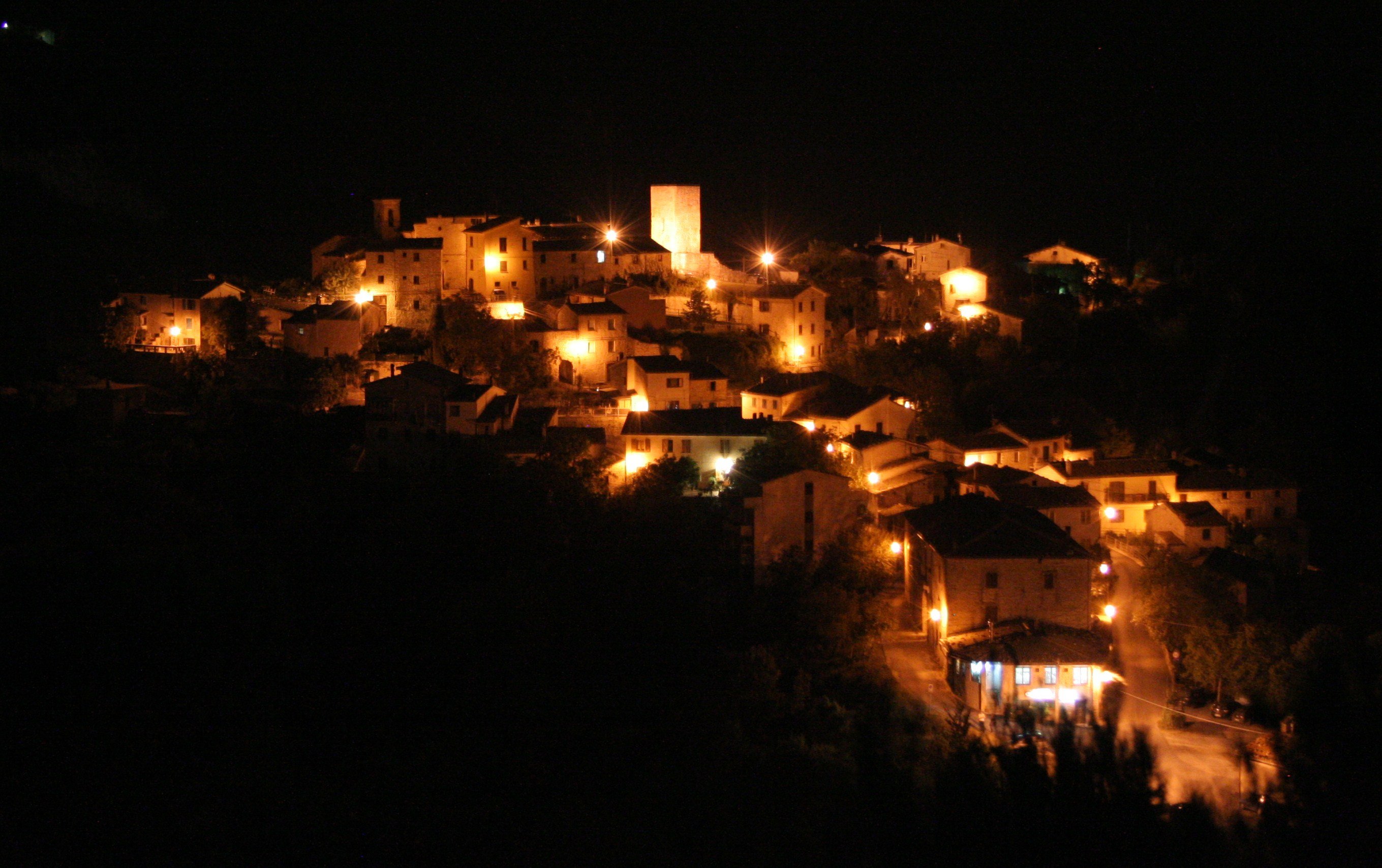 Veduta di Pierosara di notte